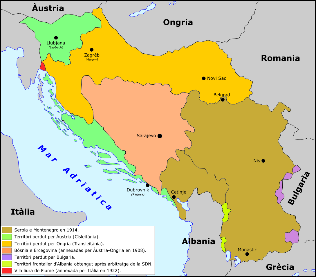 Formacion territòriala d'Iogoslavia après la Premiera Guèrra Mondiala.